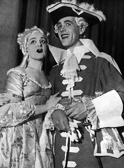 Hjördis Schymberg opch Hugo Hasslo i Così fan tutte